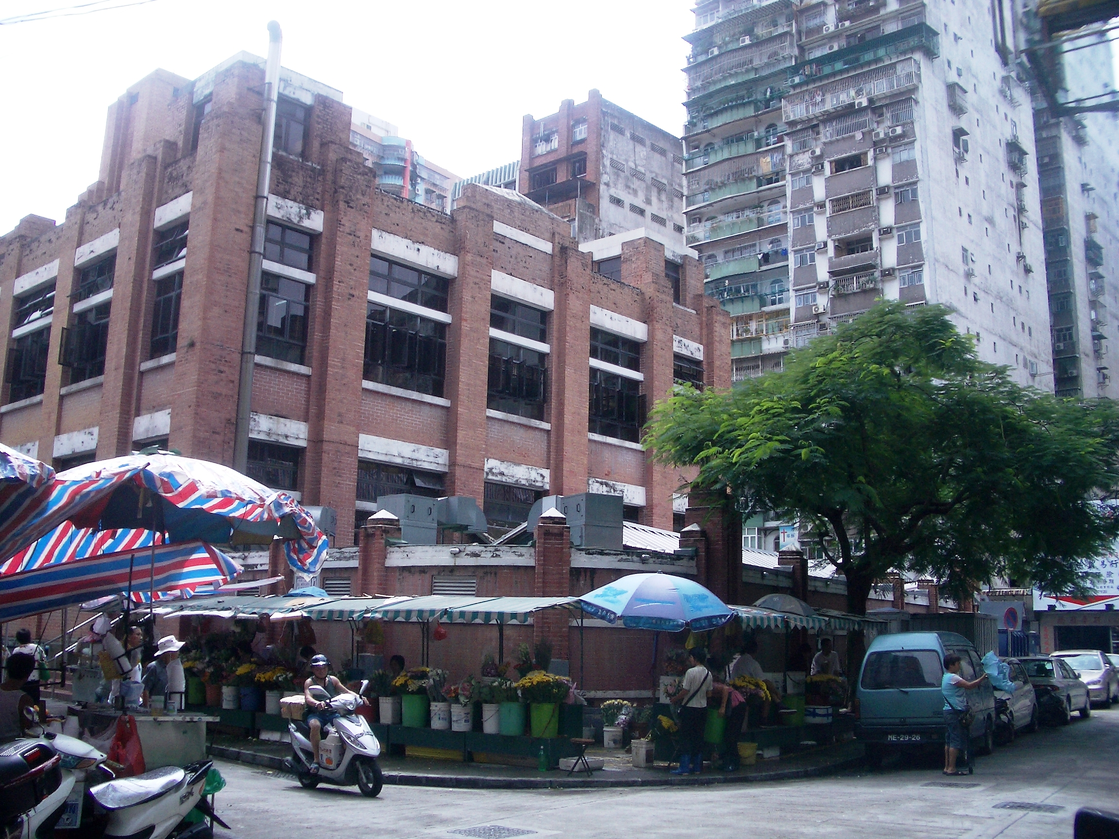 Red Market, taken by me